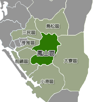 高雄市鳳山區相對位置。